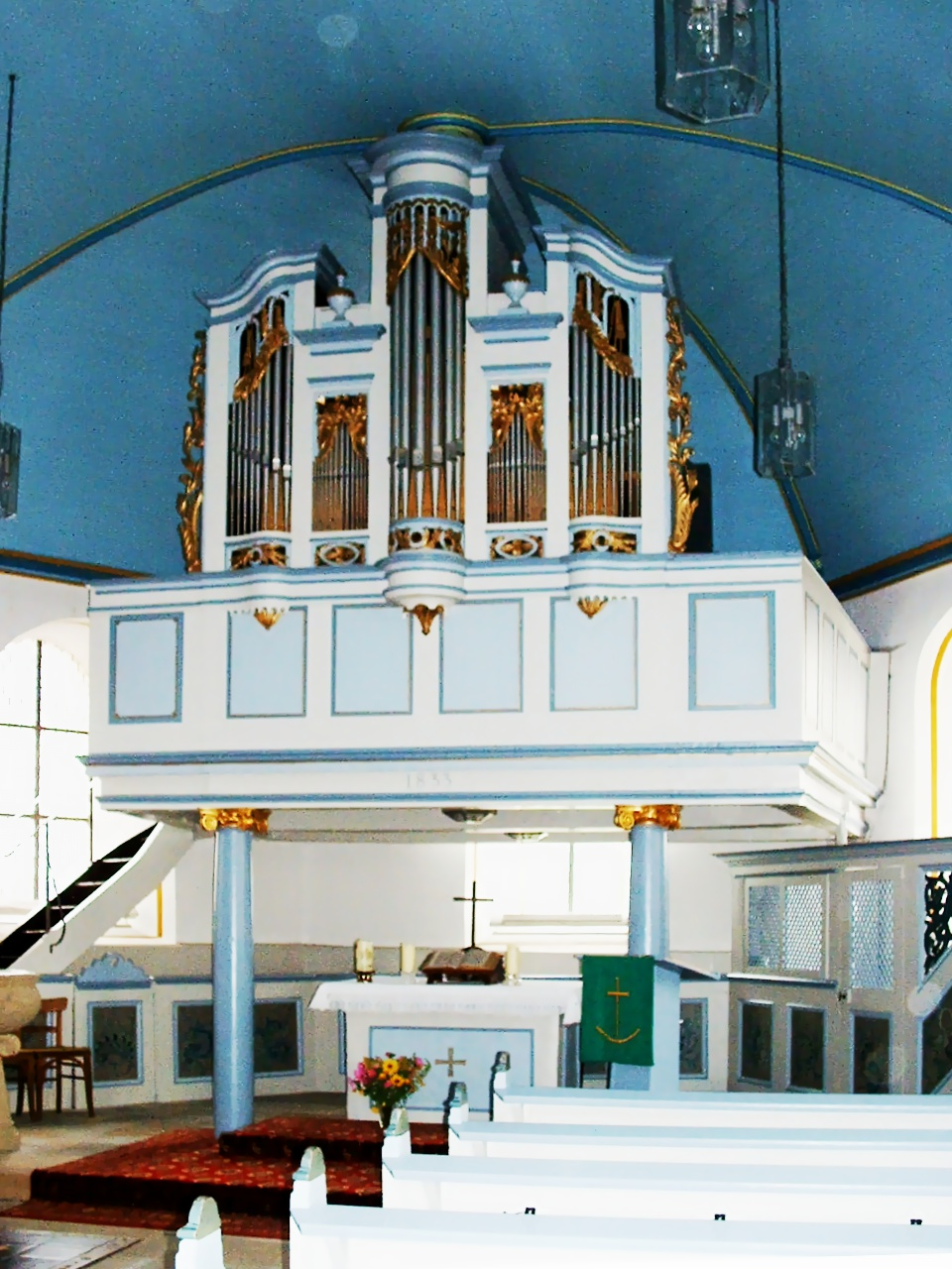 Evangelische Kirche Bruchweiler, Stumm Orgel